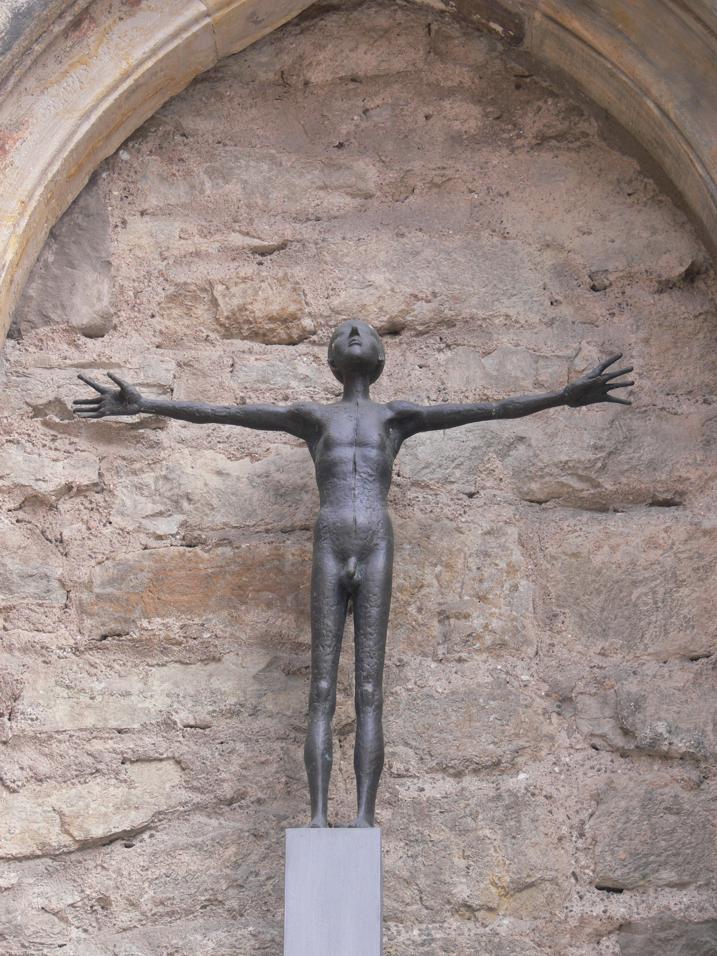 Reglerkirche Erfurt Statue neben dem Hauptportal (außen): Volkmar Kühn: "Mildenfurther Kreuzmensch", Bronze 2002